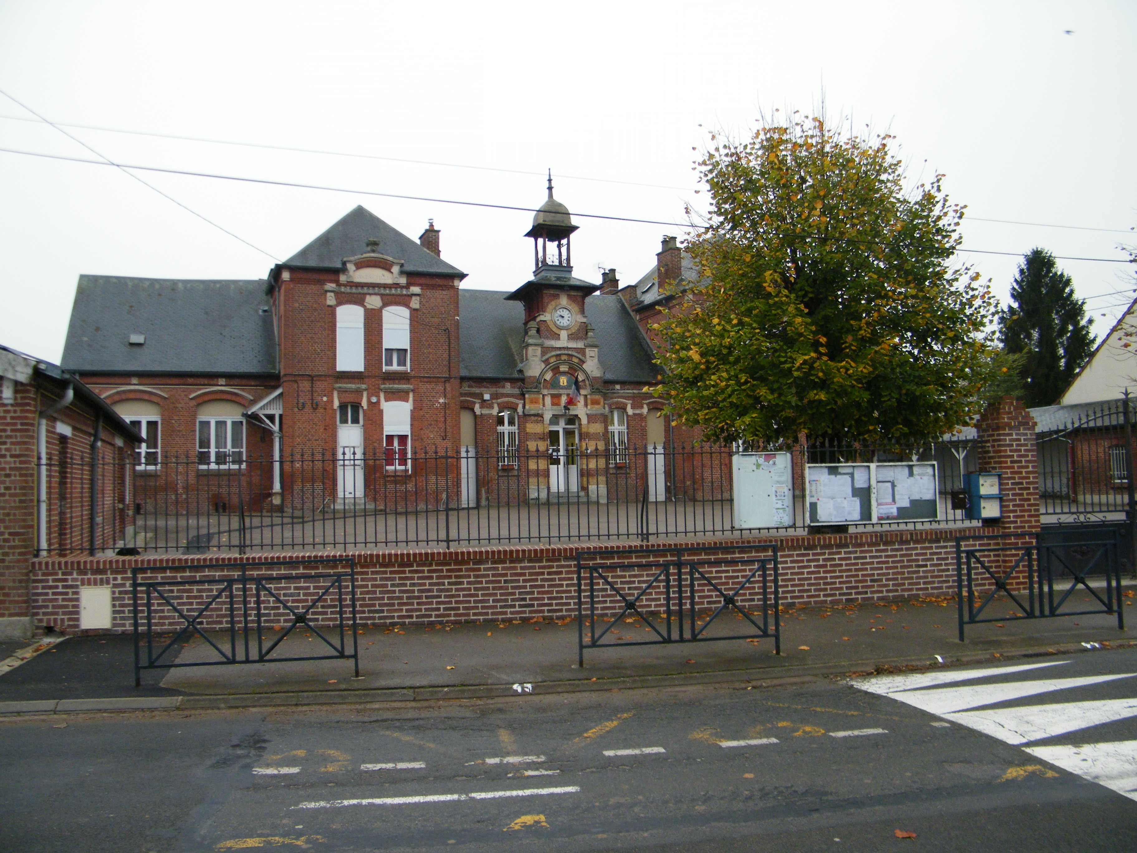 Bâtiments communaux, mairie-école.